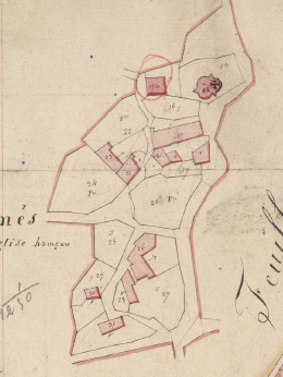 Planès de l'Església en el Cadastre napoleònic del 1812 (Arxius Departamentals dels Pirineus Orientals)